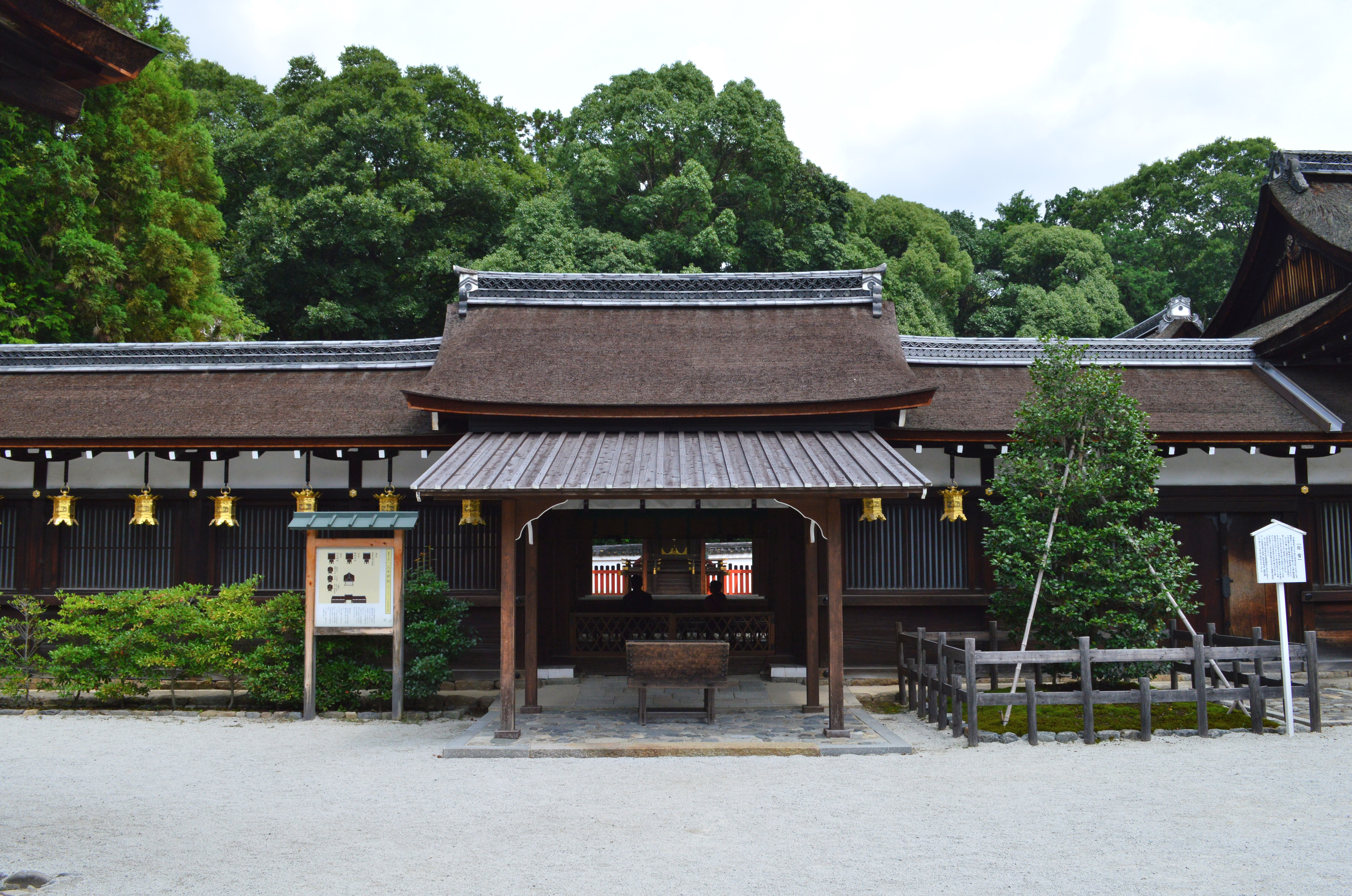 賀茂御祖神社 境内三井神社 神門